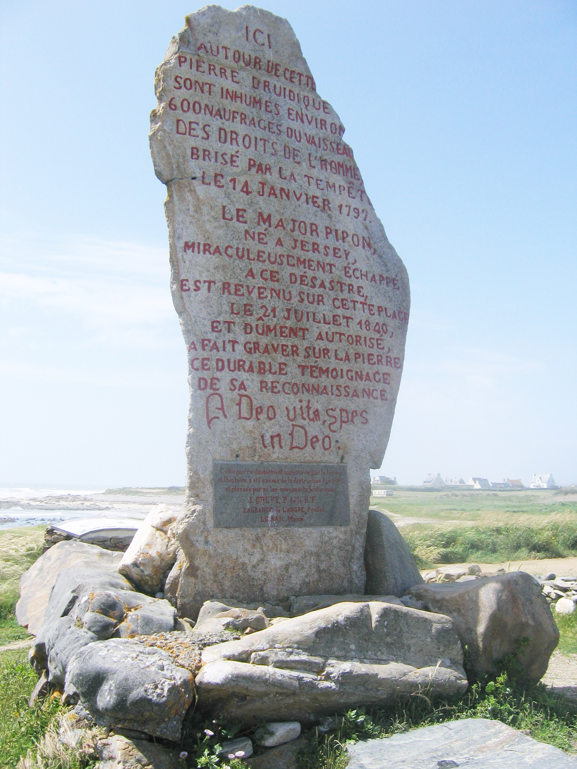 Plozévet le Menhir des Droits de l'Homme, plage de Kerrest